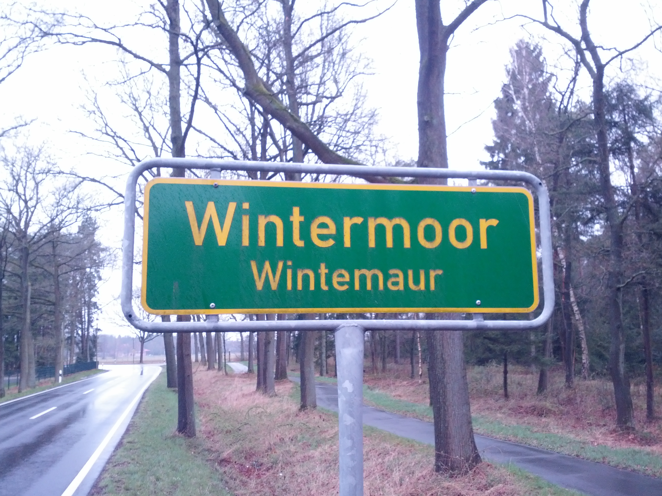 Oortsschild mit den Naam op Hoochdüütsch un op Plattdüütsch